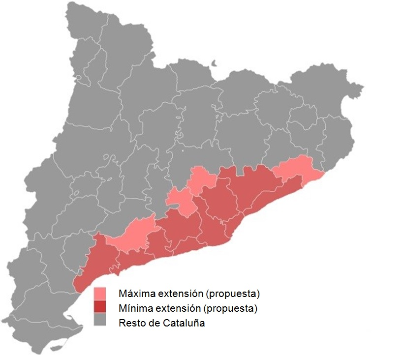 Extensión propuesta para Tabarnia.